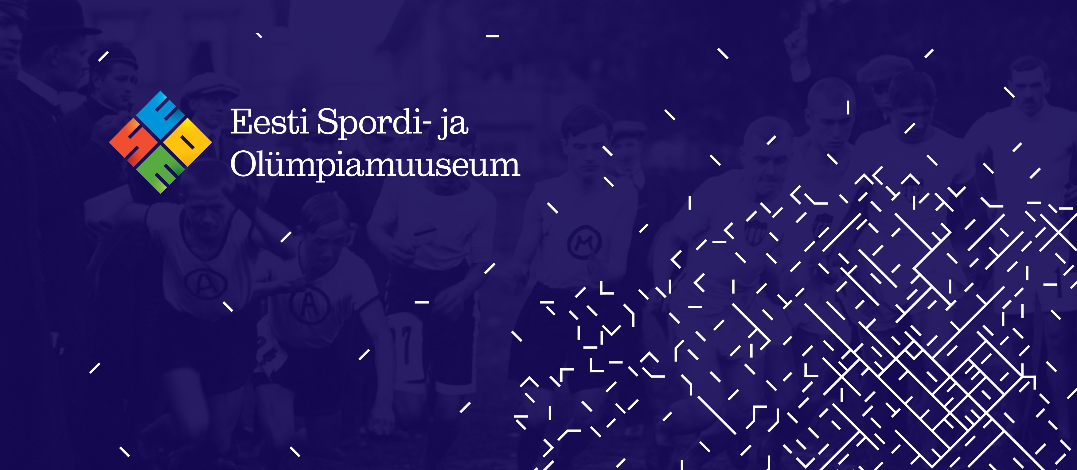 Eesti Spordi- ja Olümpiamuuseumi uus visuaalne identiteet.